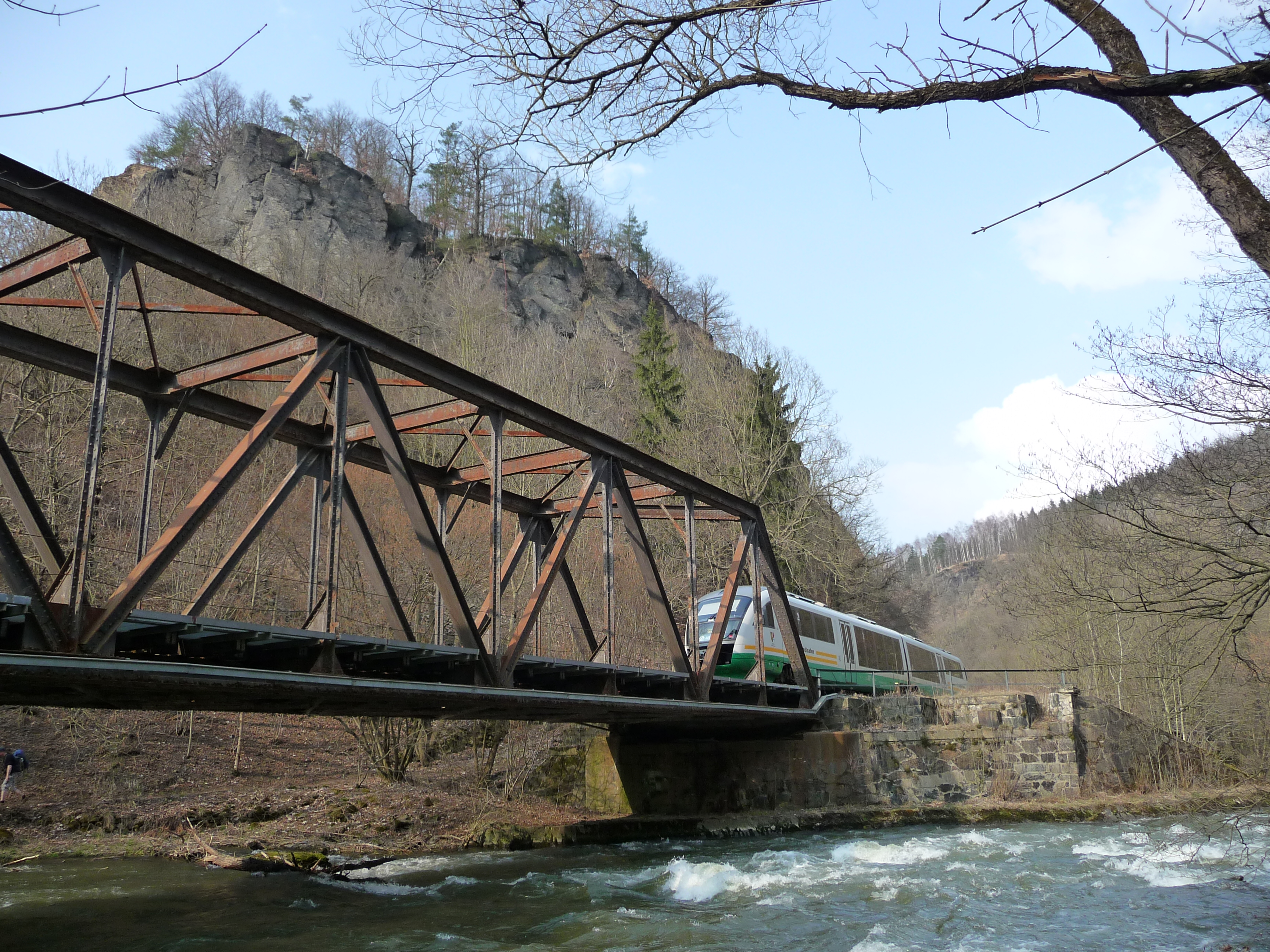 Steinicht: Blick über die Weiße Elster mit Eisenbahnbrücke zum Nelkenstein im Naturschutzgebiet „Steinicht“ (Thüringen); Vordergrund in Sachsen